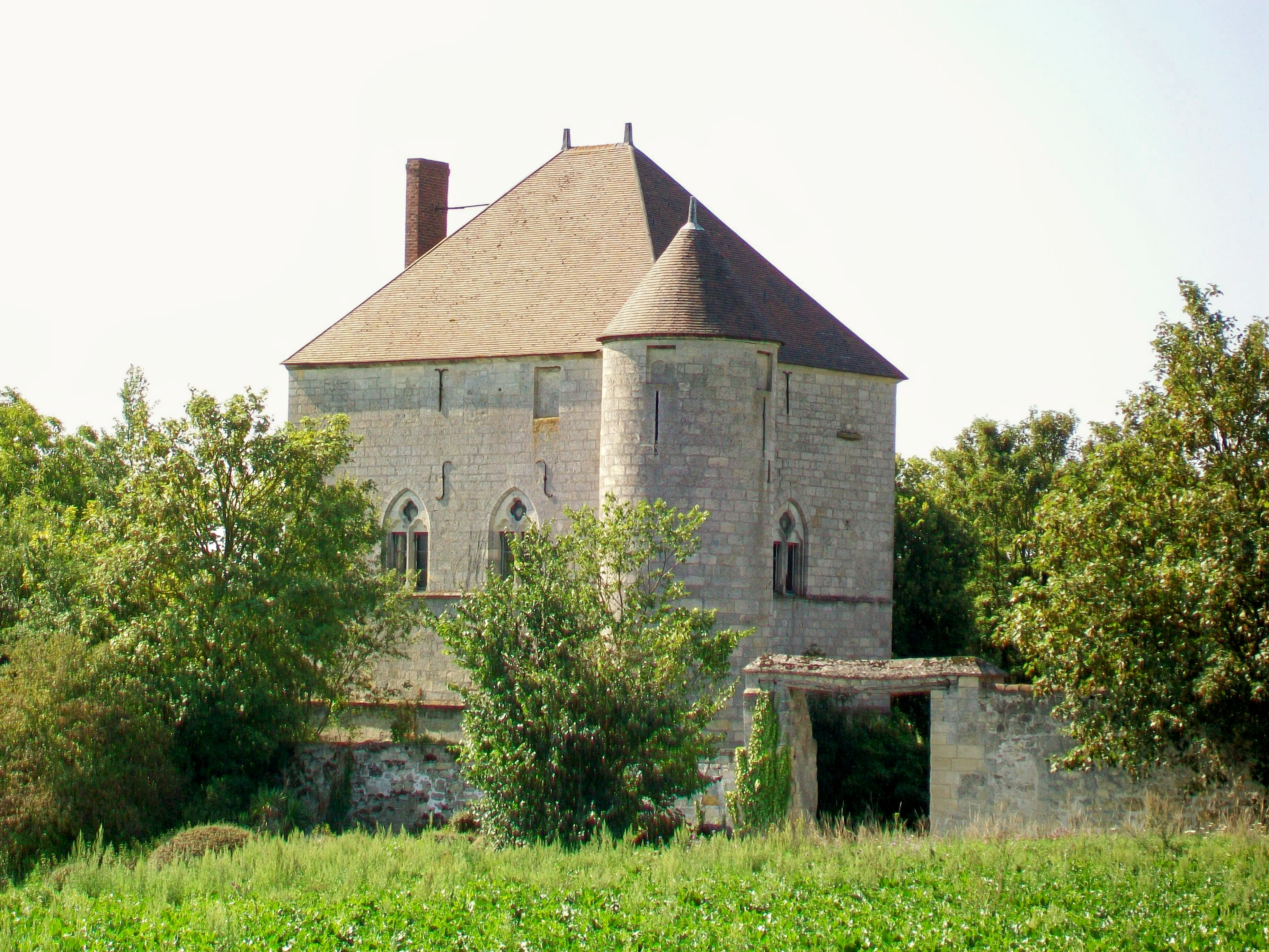 Ferme de Morancy, manoir fortifié du XIIIe siècle.